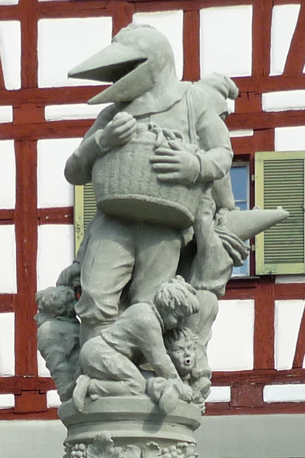 Detail des Schnabelgierebrunnens in Meersburg aus dem Jahr 1964